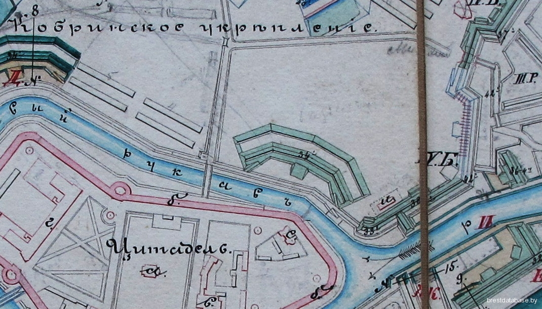 Фрагмент плана работ 1868 г. Из архива БРОКМ, КП 15241/014.